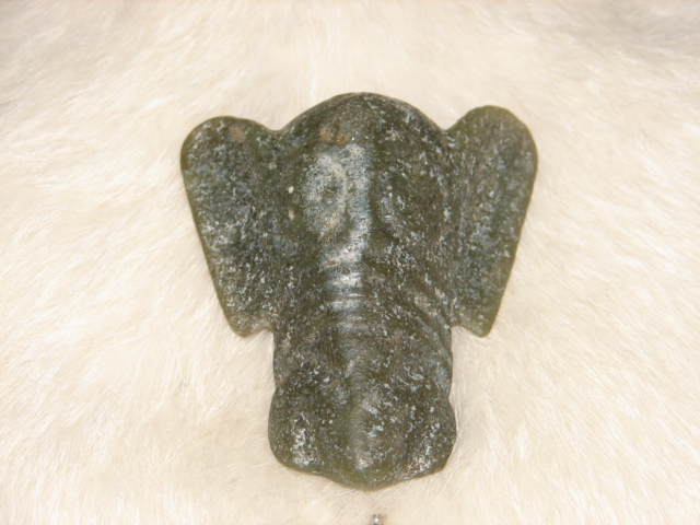 紅山文化年代3500-5500 紅山文化-小件配飾品.有數百種的造形.玉c形龍.猪龍.玉梟.玉鷹.面具三孔器.異獸.玉蟬複合體.太陽神等。 此器質化晶變‧次晶增生未受人工拋光打磨、 保留原始風化 、生坑未盤玩，三面立體.造形特別‧曲線流暢.雕工傳神‧創意佳。 ﹝藝術品﹞ 鑑定工具：1強束光筒2放大鏡﹝10倍﹞3光譜儀 藝術品